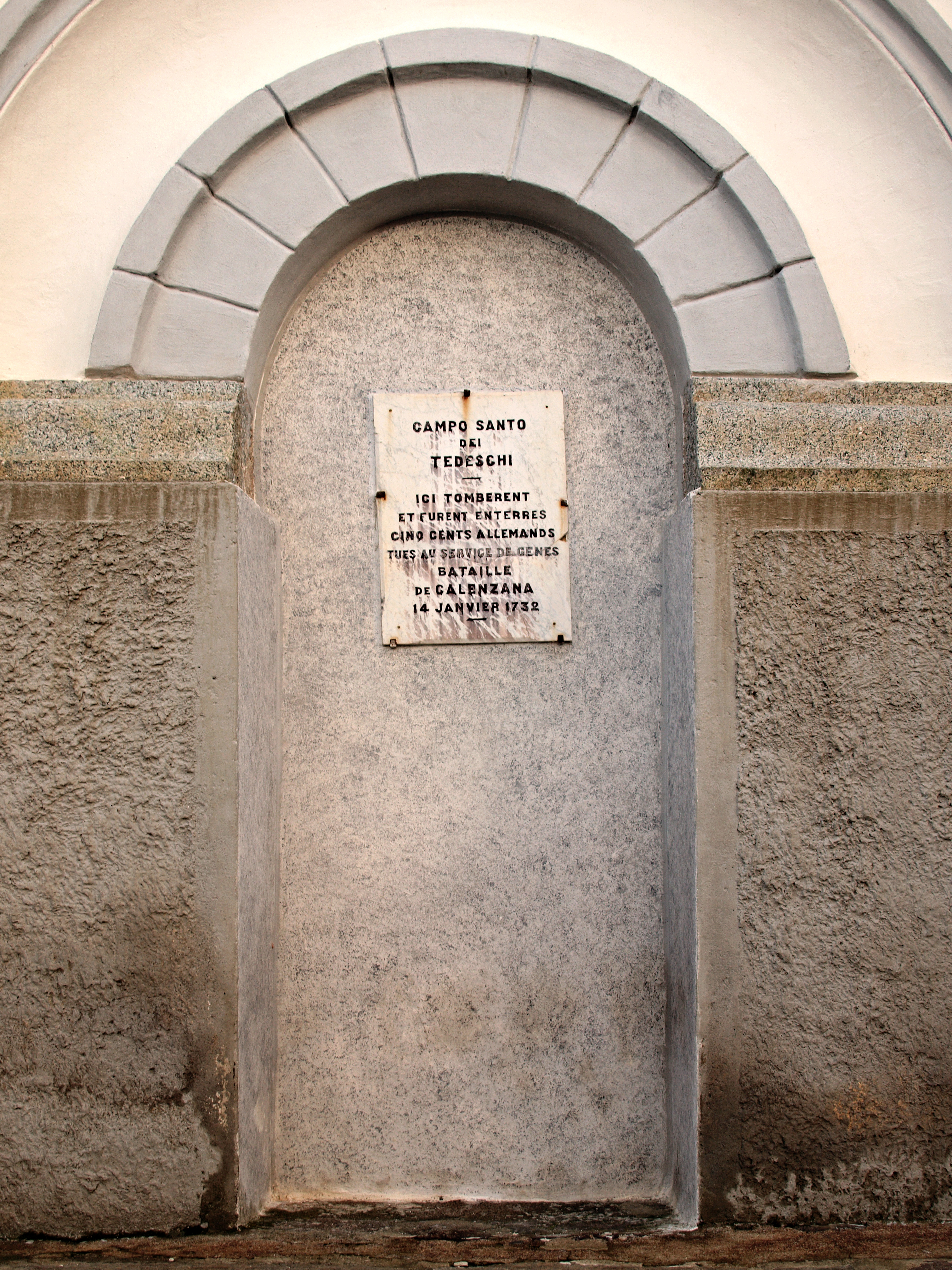 Calenzana (Corse) - Mémorial de la Bataille de Calenzana apposé sur le campanile de l'église Saint-Blaise